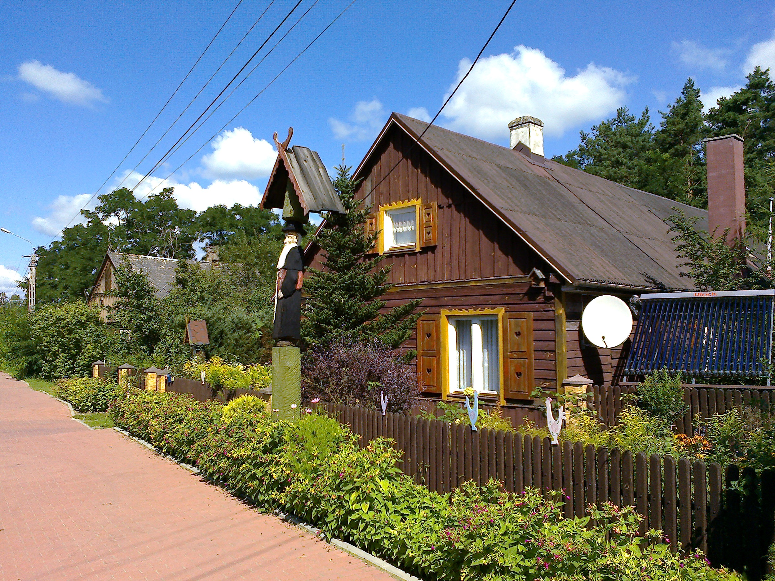 Czarnia